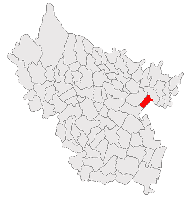 Categorie:Hărţi ale judeţului Buzău